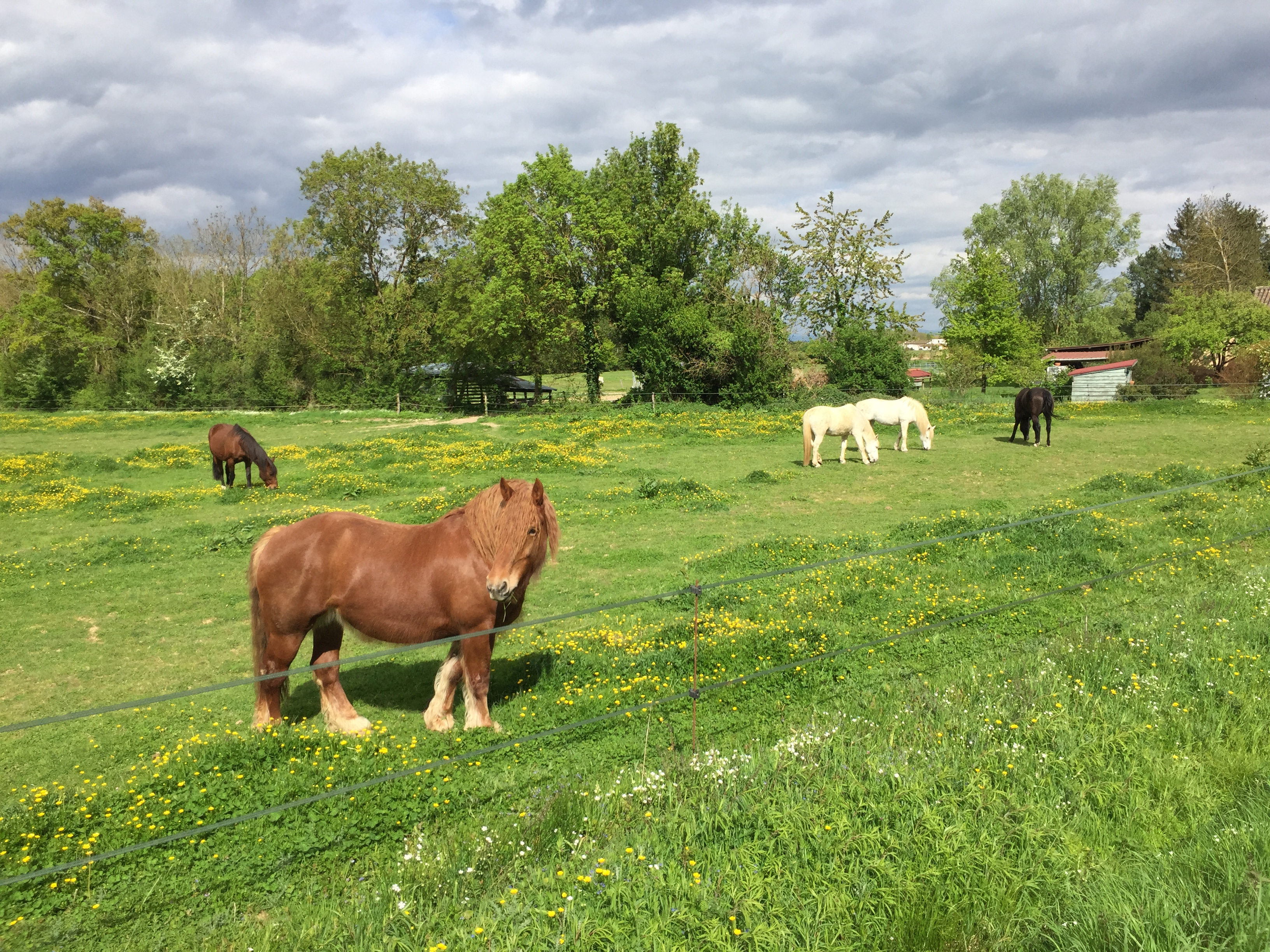 Image du village de Sainte-Olive, dans l'Ain, en France.